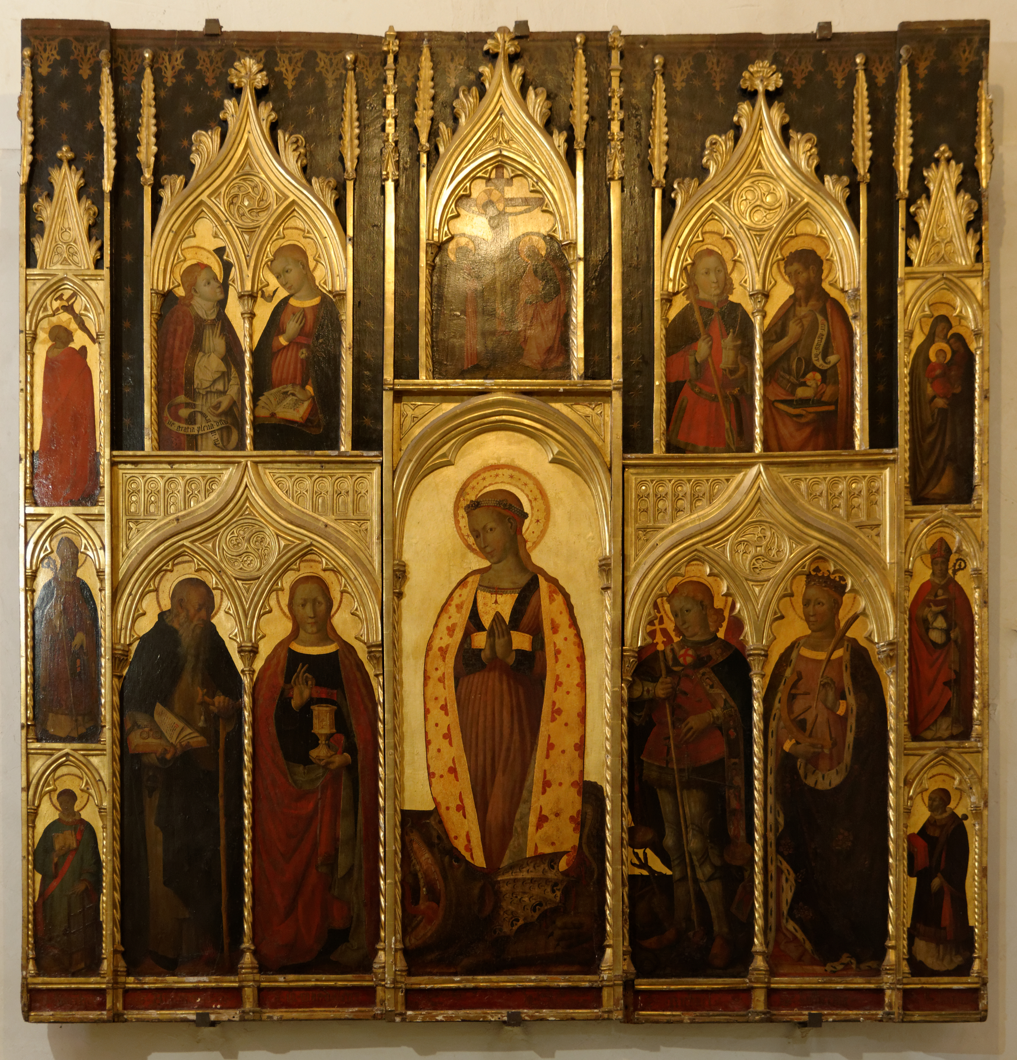 Retable de Sainte Marguerite. Cathédrale Saint Léonce (Fréjus, Var, France)